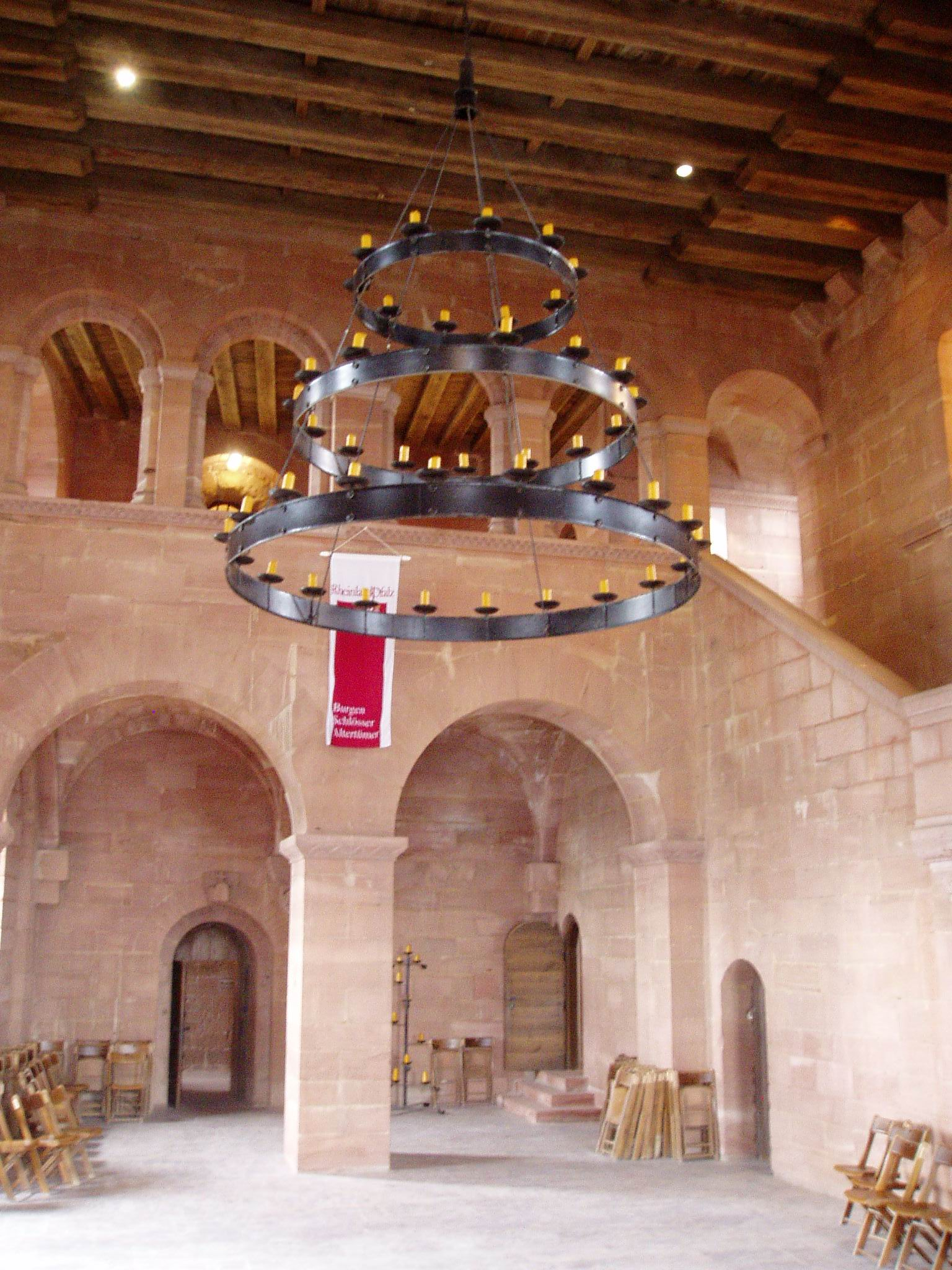 Saal der Burg Trifels, Pfalz, Deutschland